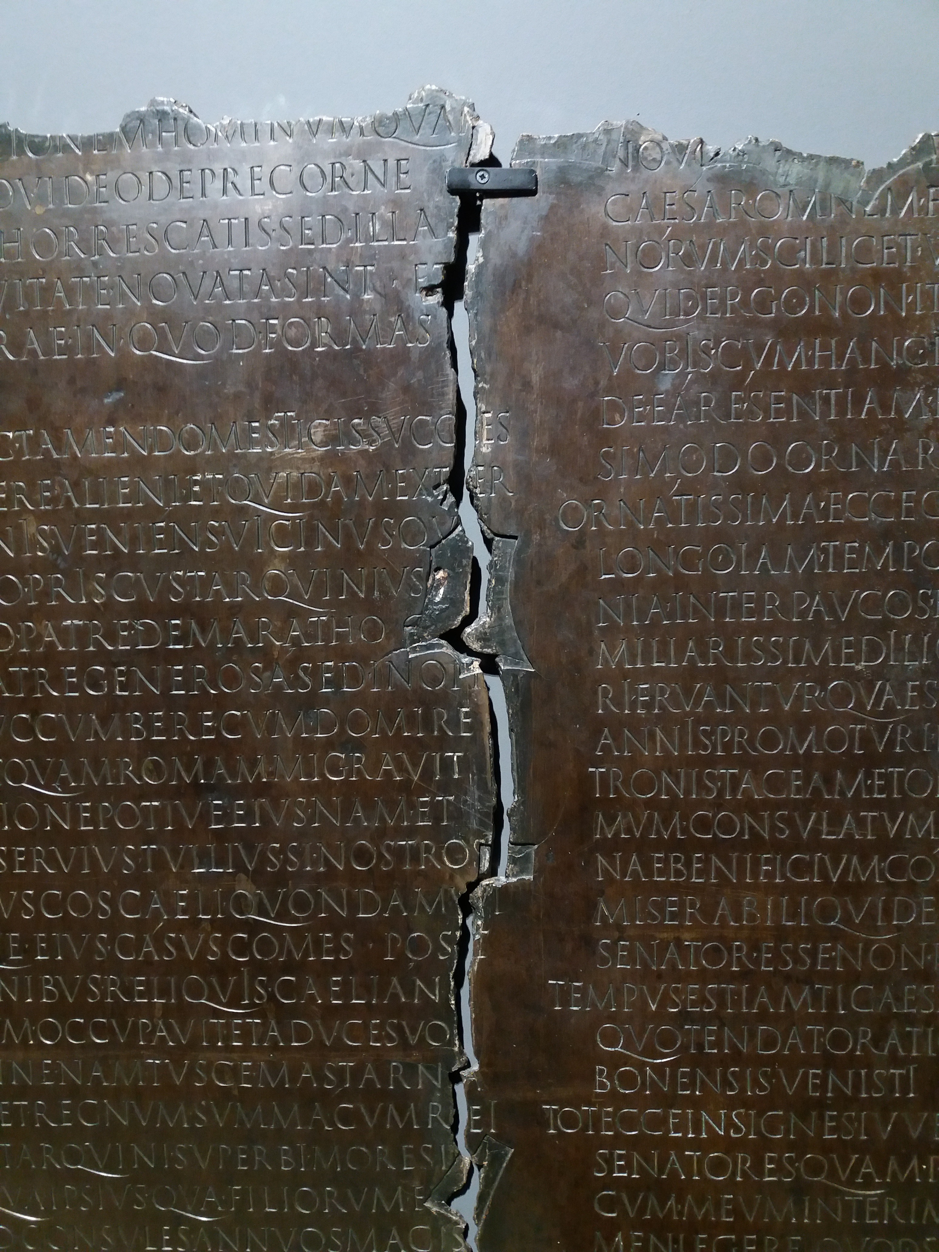 Table claudienne, haut de la fracture entre les plaques.